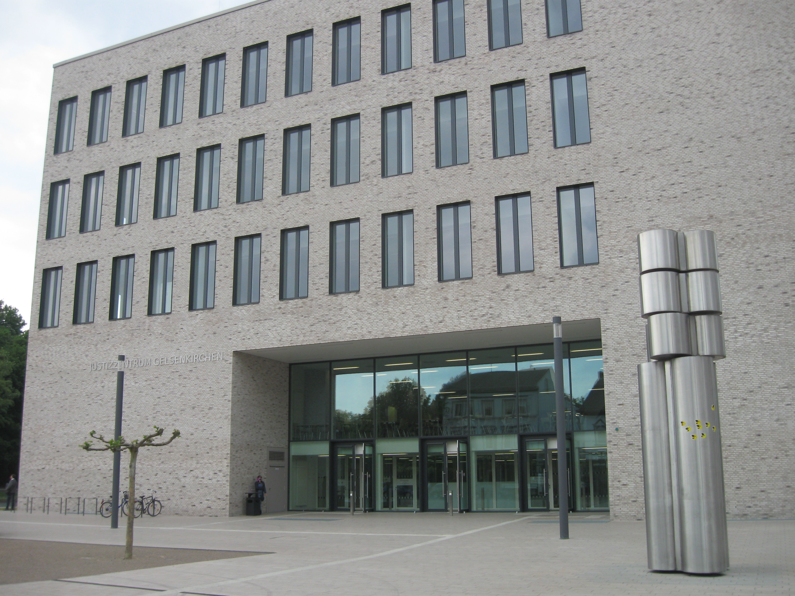 Hauptfassade (Westseite) des Justizzentrums Gelsenkirchen (Bochumer Straße 79, errichtet 2013–2015). Im Justizzentrum Gelsenkirchen sind seit Januar 2016 das Amtsgericht Gelsenkirchen, das Arbeitsgericht Gelsenkirchen und das Sozialgericht Gelsenkirchen untergebracht. Im Vordergrund die bewegliche Skulptur Mobile Plastik ohne Titel von Günter Tollmann (1973). Sie stand bis Ende 2015 vor dem bisherigen Dienstgebäude des eh. Amtsgerichts Gelsenkirchen-Buer und wurde Anfang 2016 vor das neue Justizzentrum im Süden der Stadt versetzt.